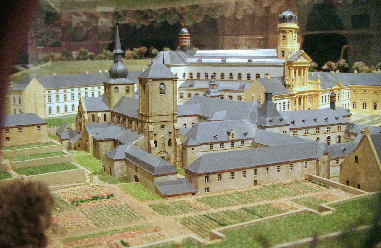 Abbaye d'Orval (Belgique). Maquette représentant l'état des bâtiments avant la Révolution. Musée de l'abbaye. Photo prise fin avril 2006 par F5ZV.